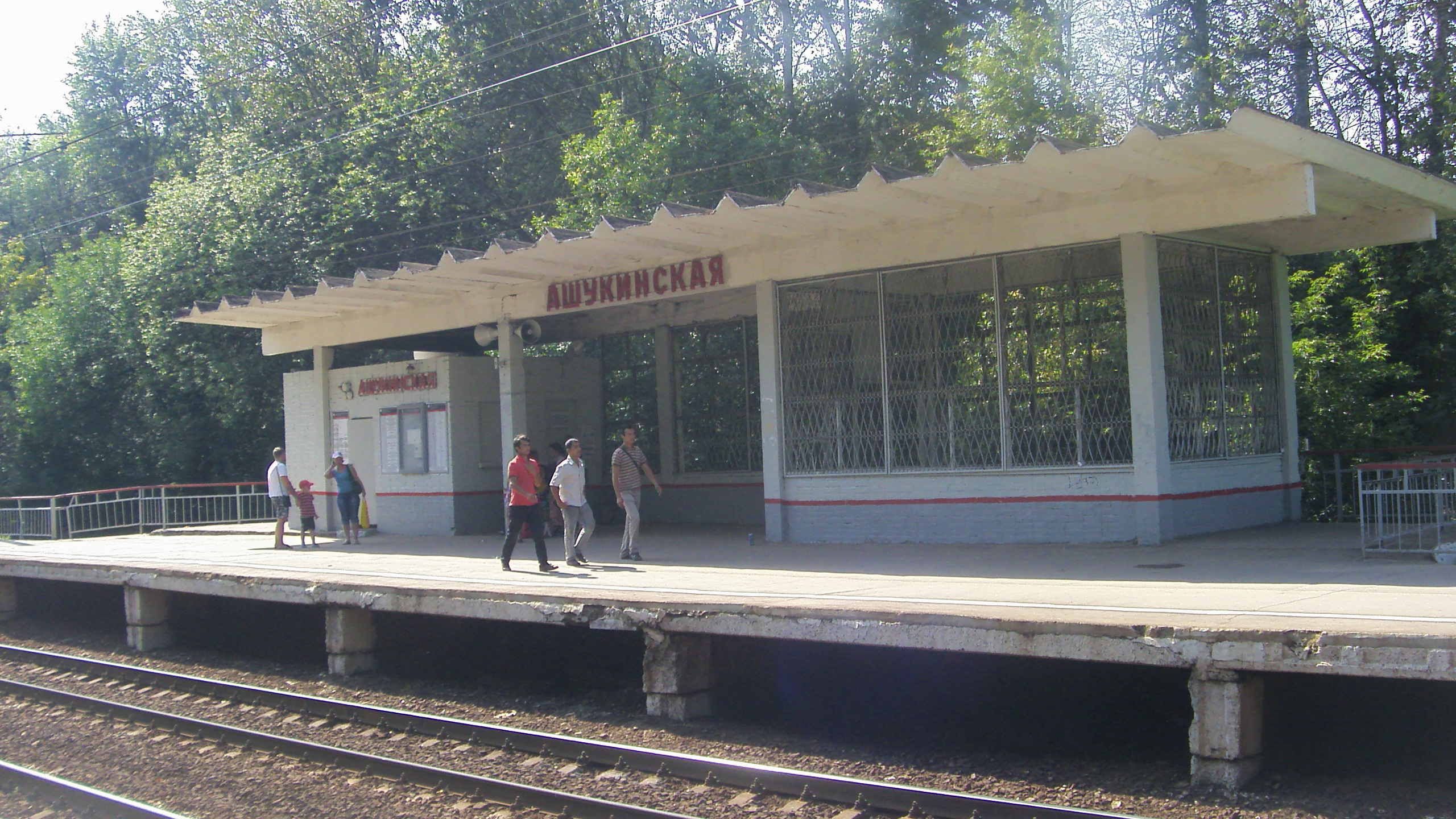 Платформа Ашукинская